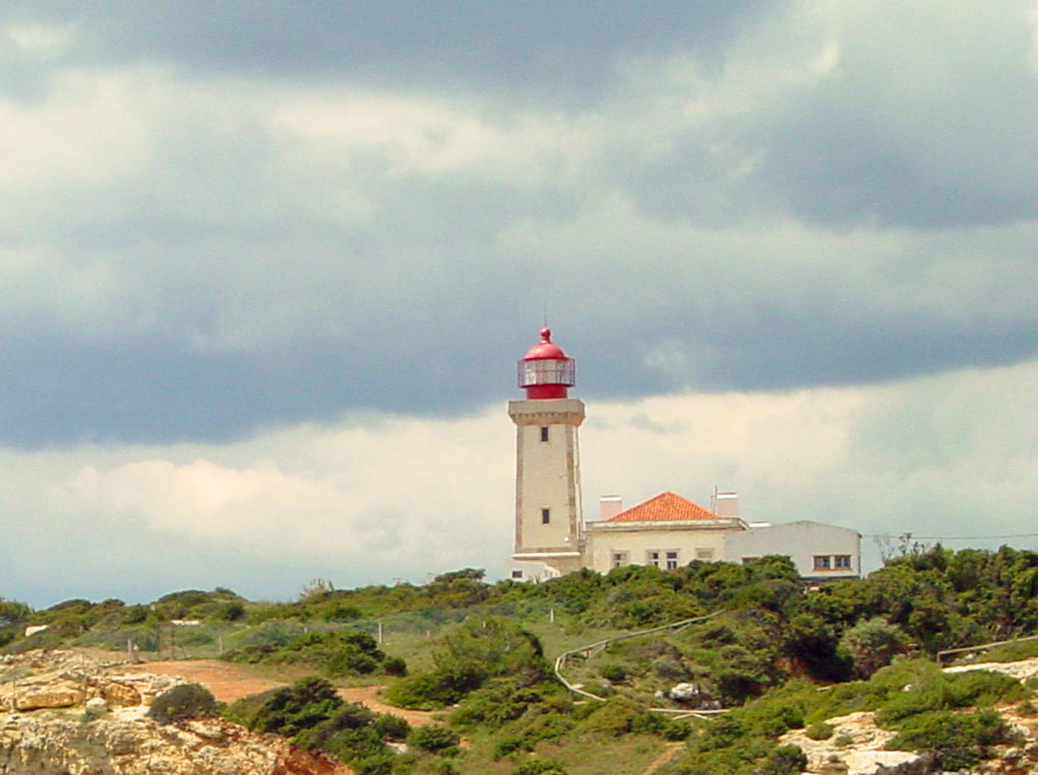 Alfanzina Lighthouse, Praia do Carvoeiro, Algarve, Portugal